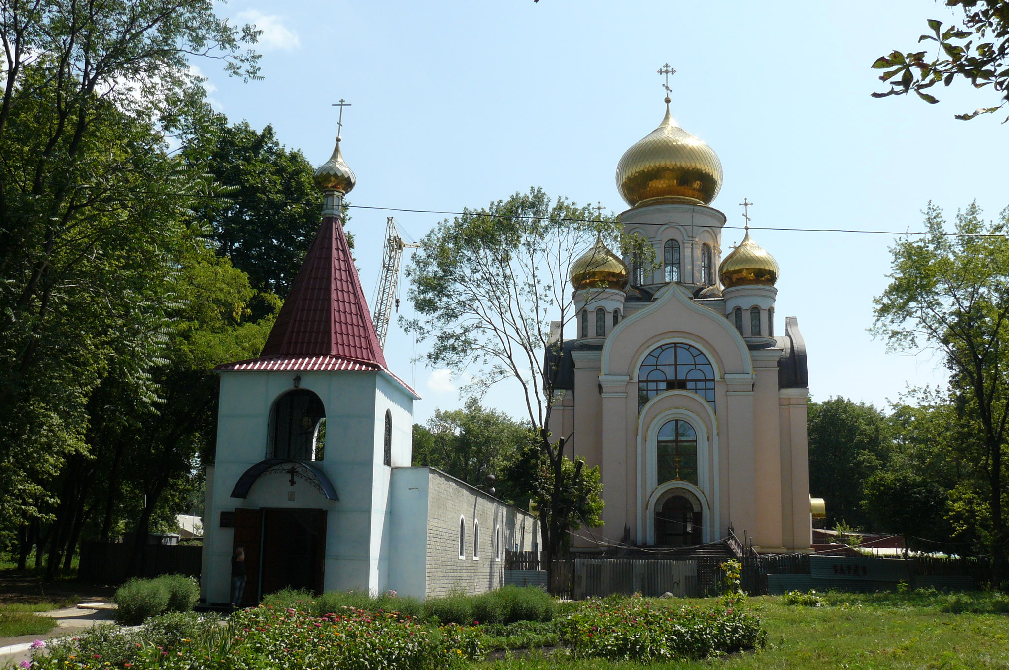 Krasnoarmijsk - cerkiew.